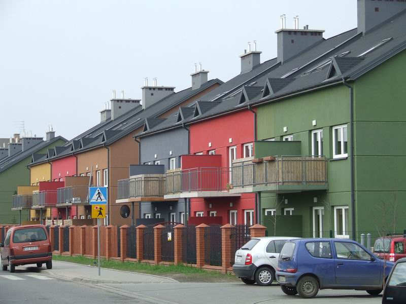 Lomianki, Rainbow settlement